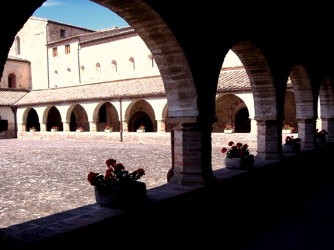 Abbazia di Chiaravalle di Fiastra